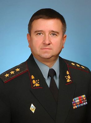 Портрет генерал-полковника Воробйова Генадія Петровича.